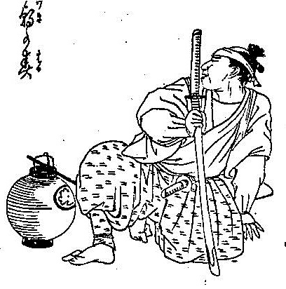 来島又兵衛